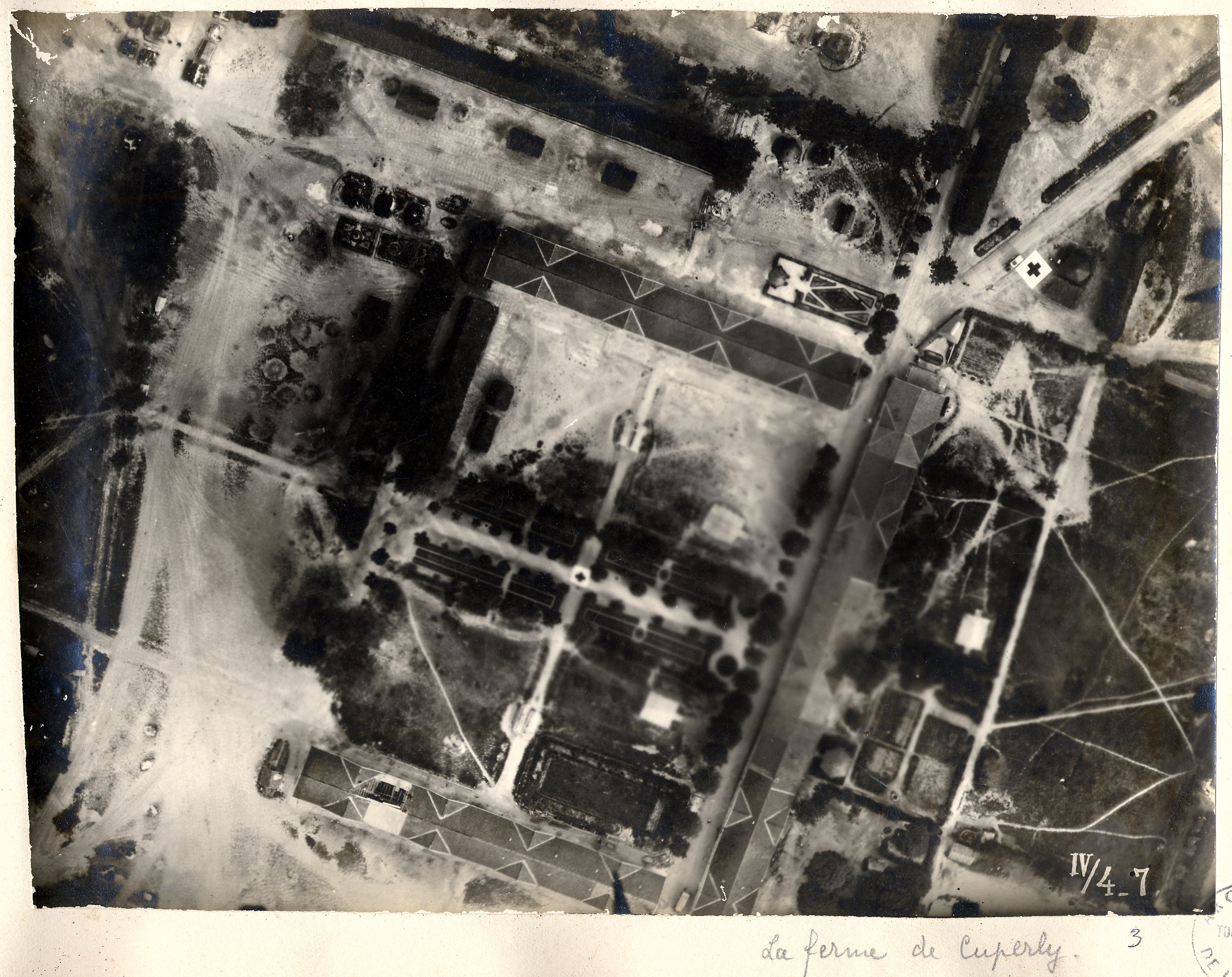 Photo aérienne verticale de la ferme de Cuperly (Marne) après un bombarbement. Mention : IV/4-7 en bas à droite du tirage. 1915. Guerre 1914-1918.